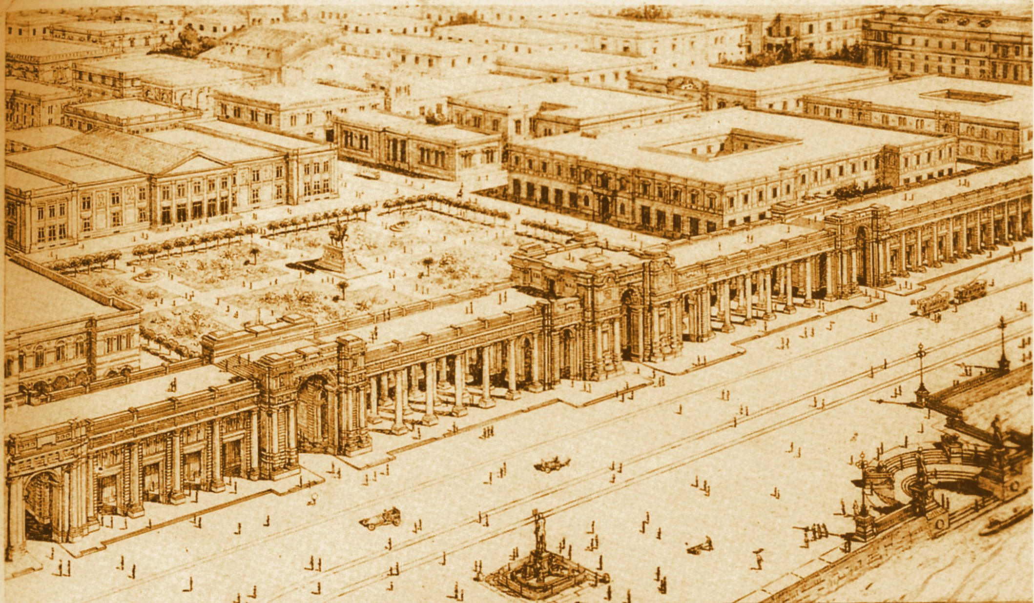 La nuova cortina del porto di Messina 1 (Luigi Borzì)